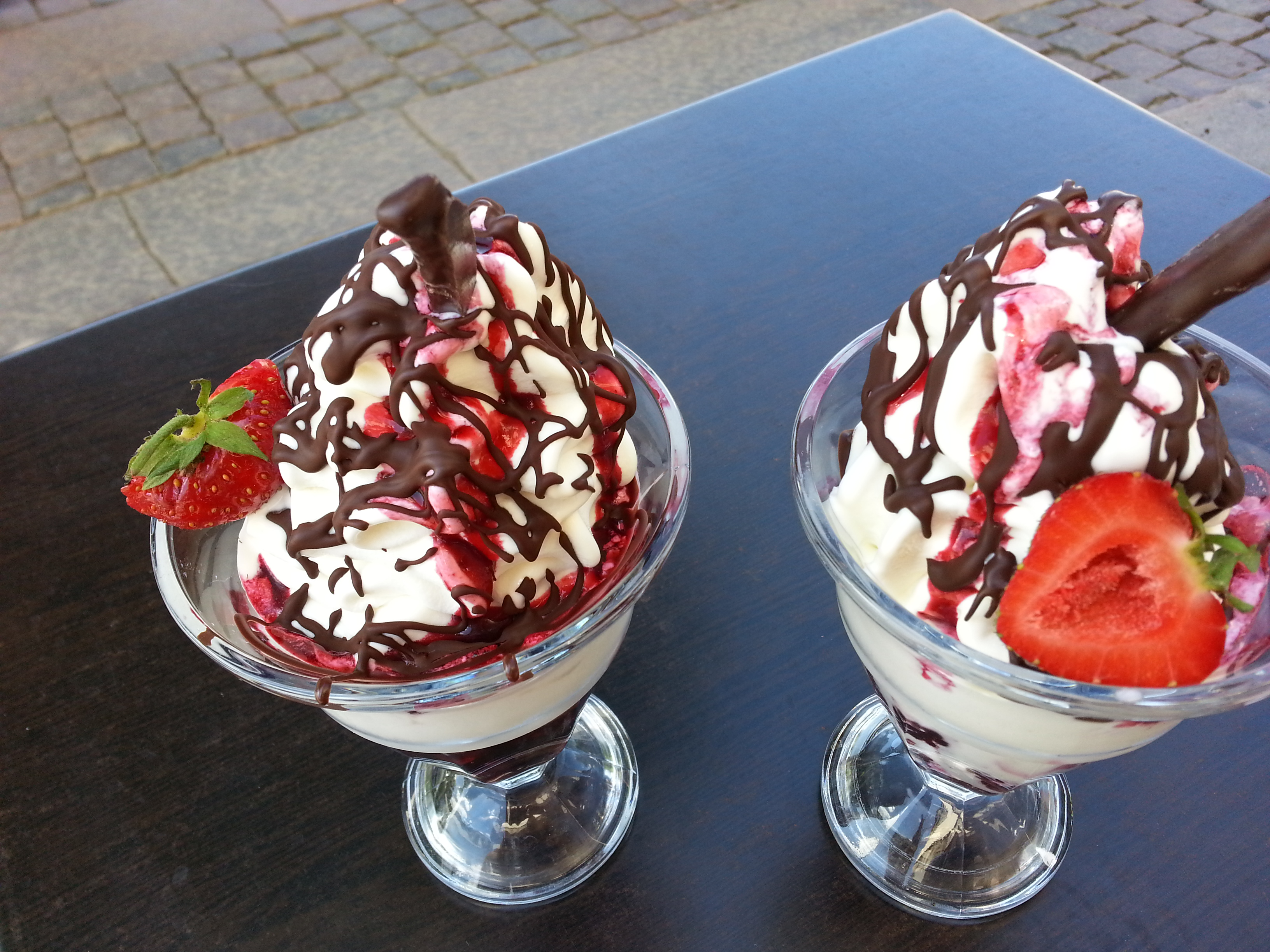 Ice cream